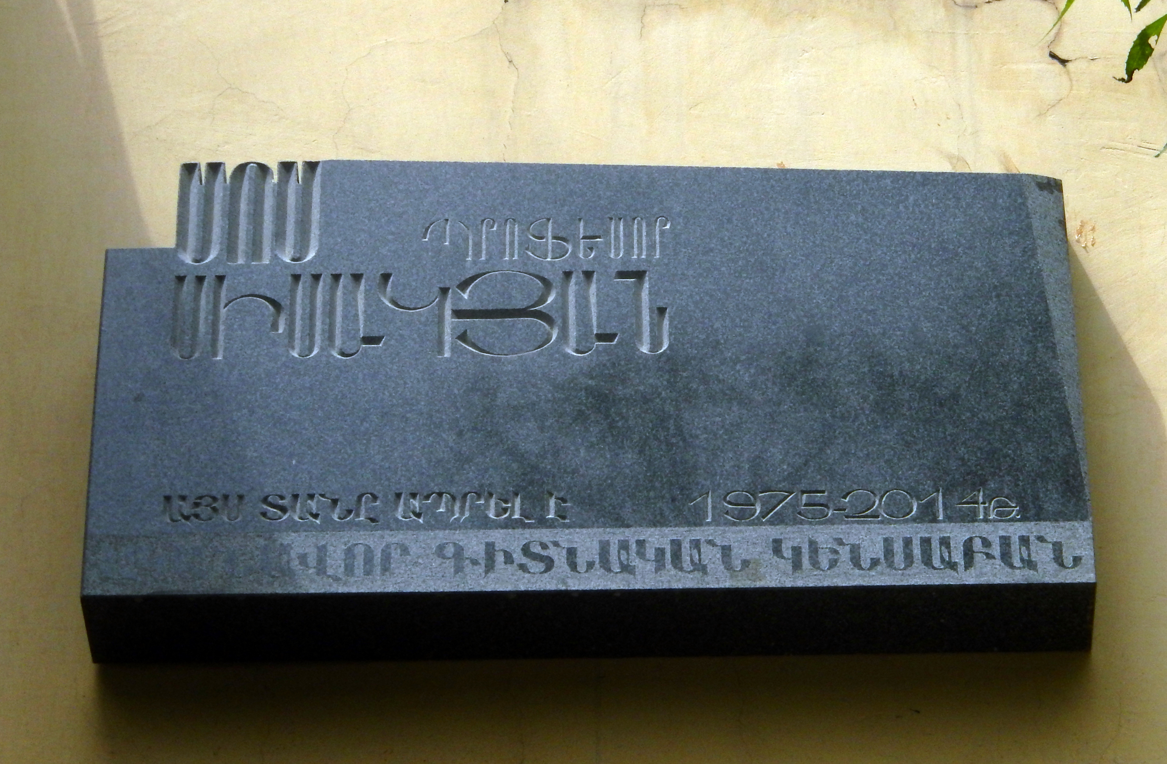 Sos Sisakyan's plaque on Nalbandyan street